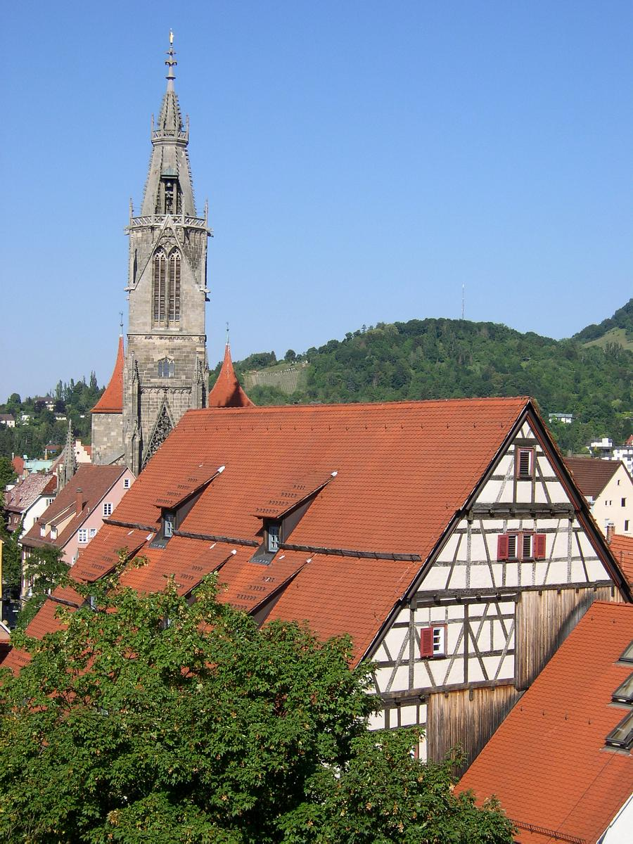 Ansicht des Turms der Marienkirche und des Heimatmuseums. Aufgenommen vom Dachgiebel des Spendhauses.